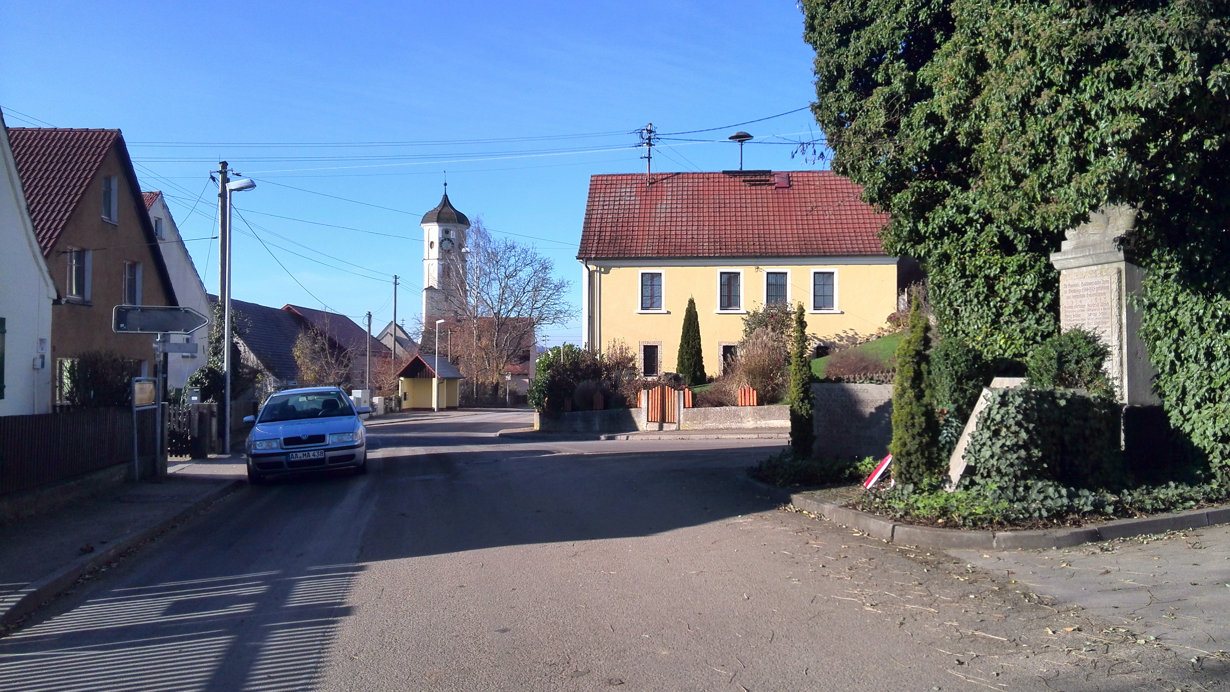 Goldburghausen